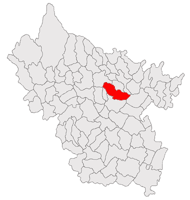 Categorie:Hărţi ale judeţului Buzău